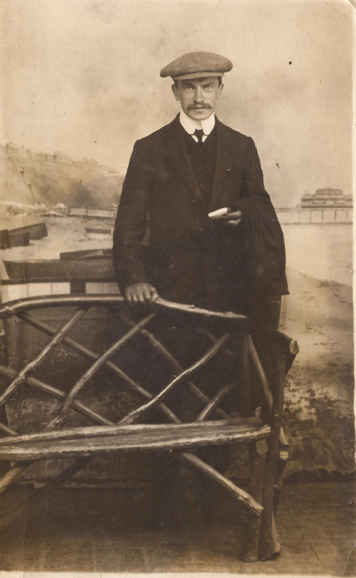 Aleksandr Yakovlevich Orlov